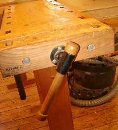 En tangstok fungerer som håndtag på henholdsvis fortang og bagtang, når et emne spændes fast i en høvlebænk. Her er vist en bagtang med tangstok på en skolehøvlebænk.